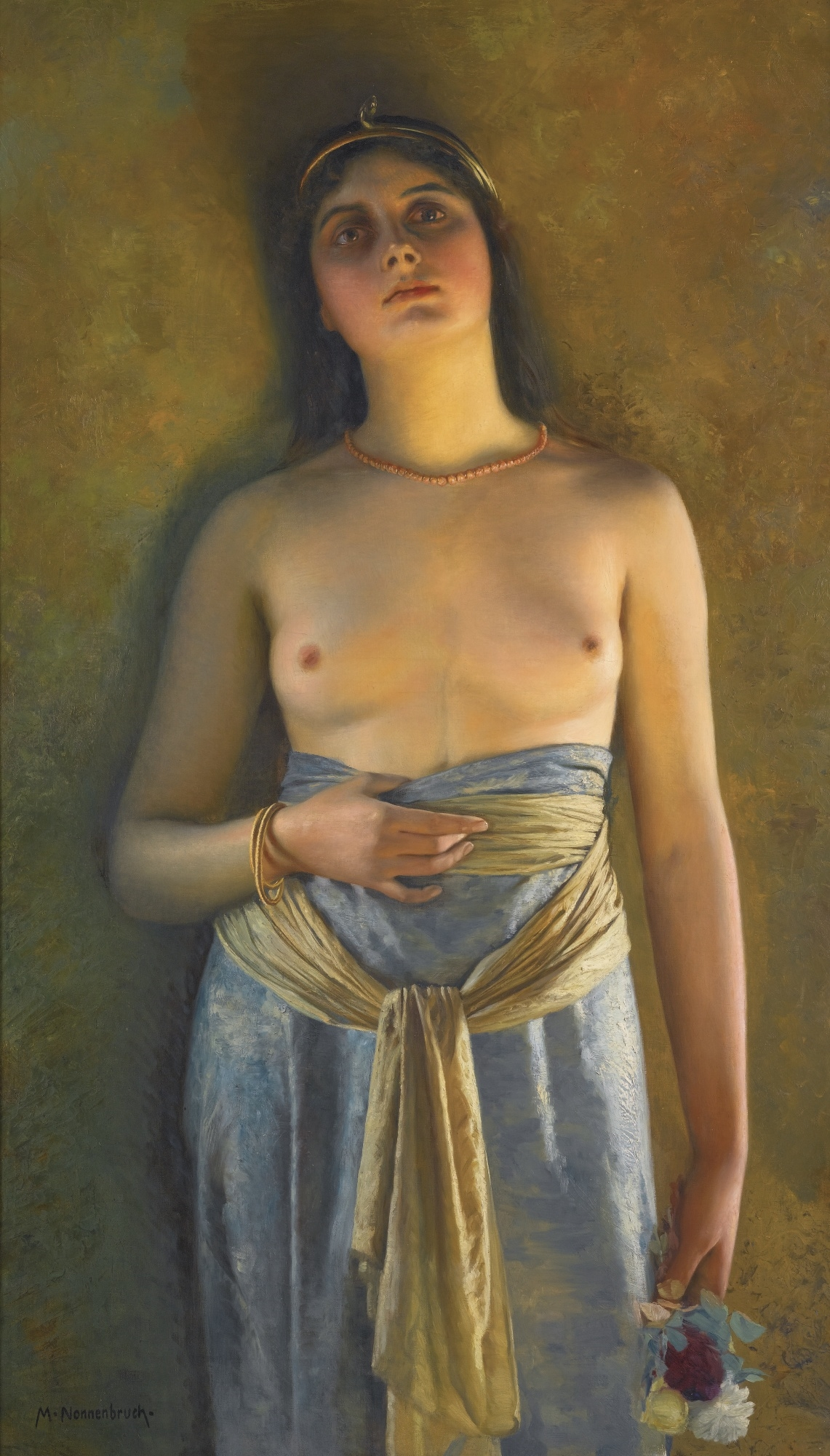 Jugend (auch Odaliske) (Öl auf Leinwand, 70,5 × 118 cm) von Max Nonnenbruch